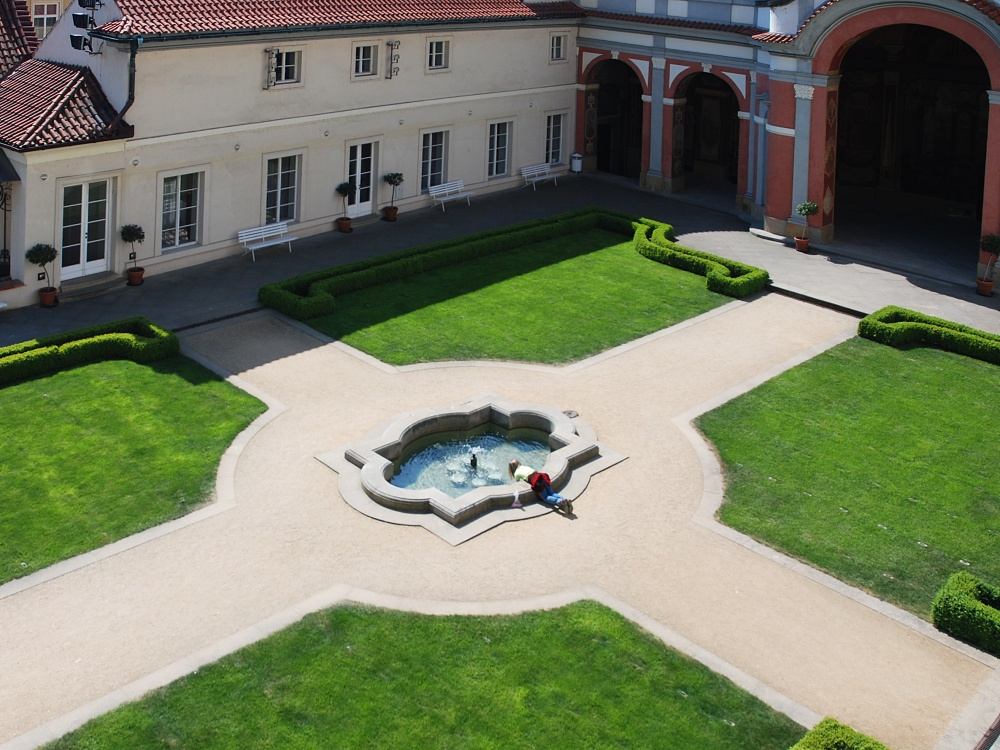 Ledeburská zahrada - spodní terasa s fontánou a salou terrenou